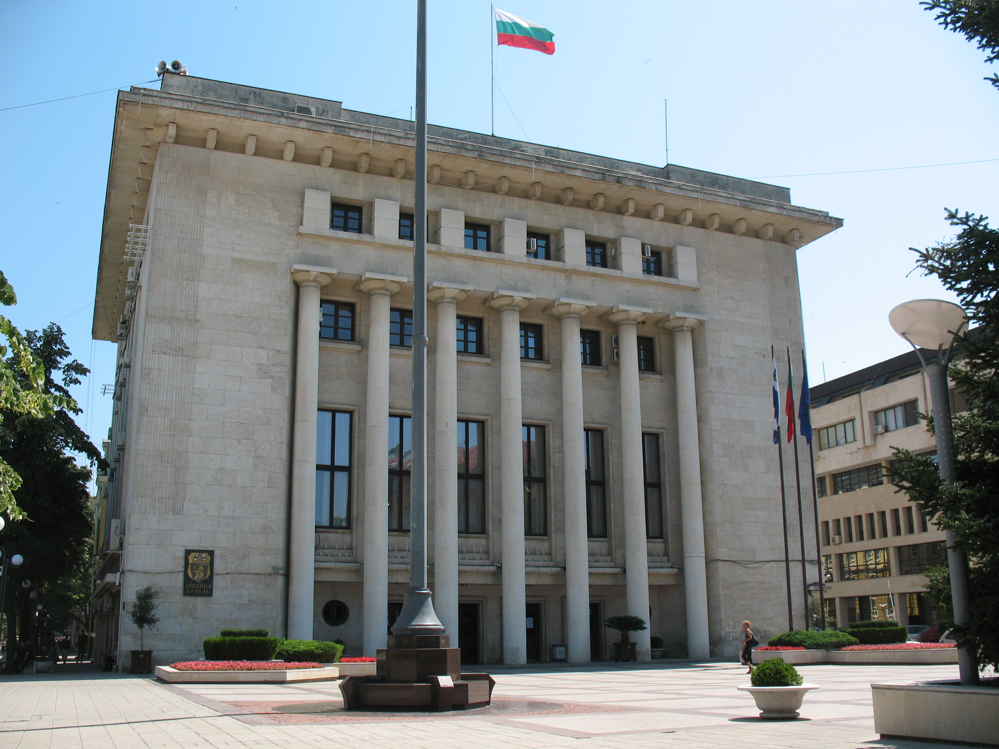 Община Бургас - общинска администрация